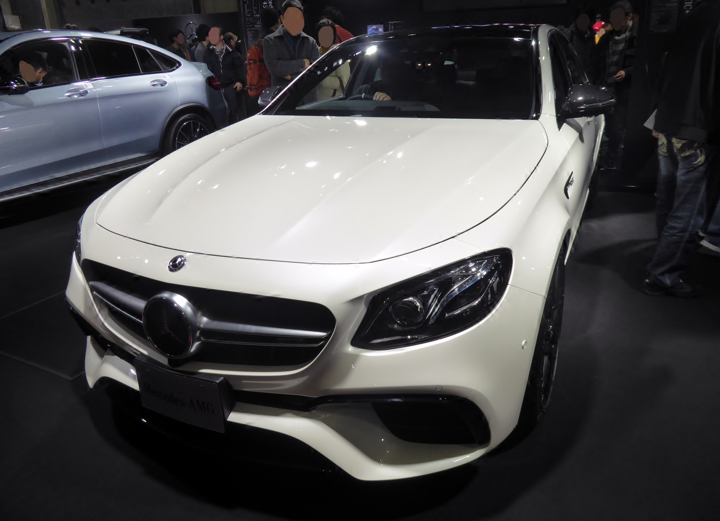 大阪モーターショー2017に於いてW213系メルセデスAMG・E63 S 4MATIC+を撮影。